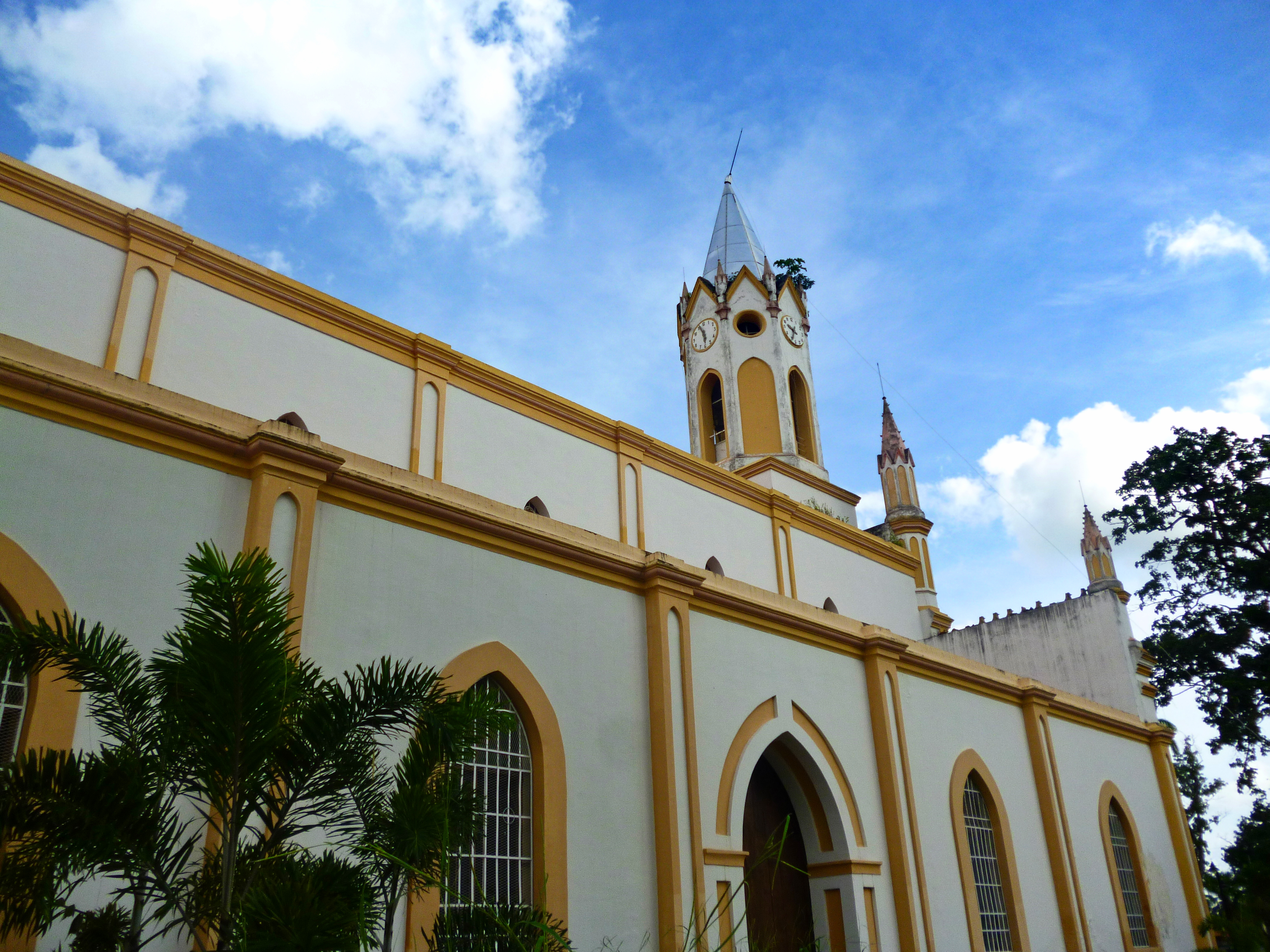 Iglesia N.S. del Socorro, Tinaquillo (lado derecho)